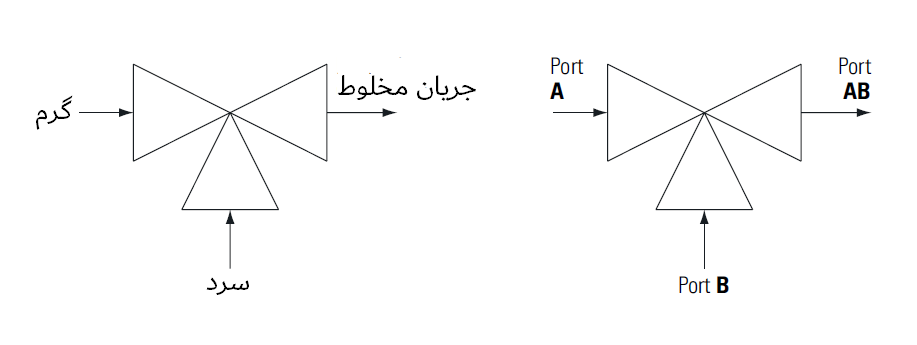 شیر سه راهه